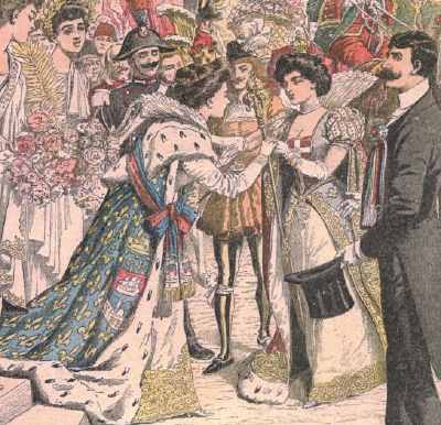 Rosina Ferro-Pia, reginetta palatina (petite reine palatine), Reine du Marché de Porta Palazzo, à Turin, accompagnée de sa cour, accueille Jeanne Troupel, Reine des Reines de Paris, à Turin, en septembre 1904.